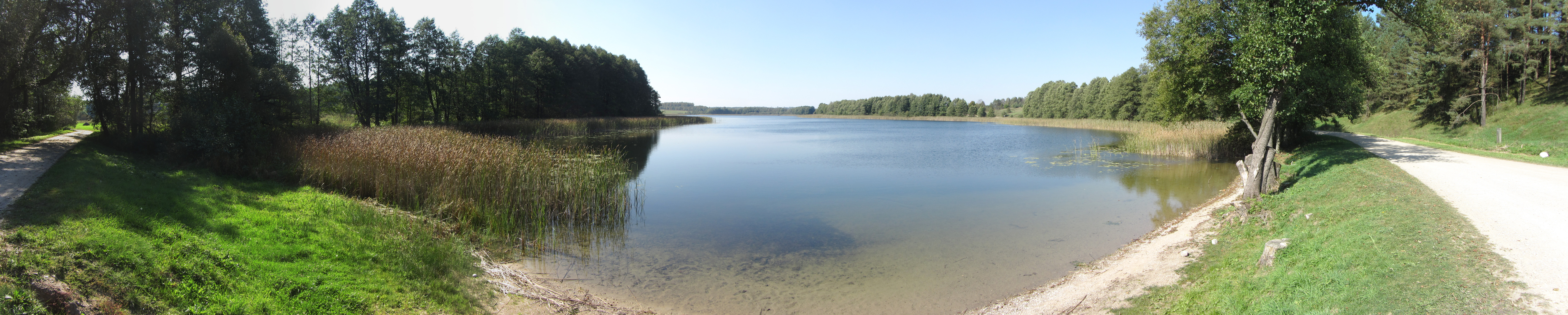 Grendavės sen., Lithuania